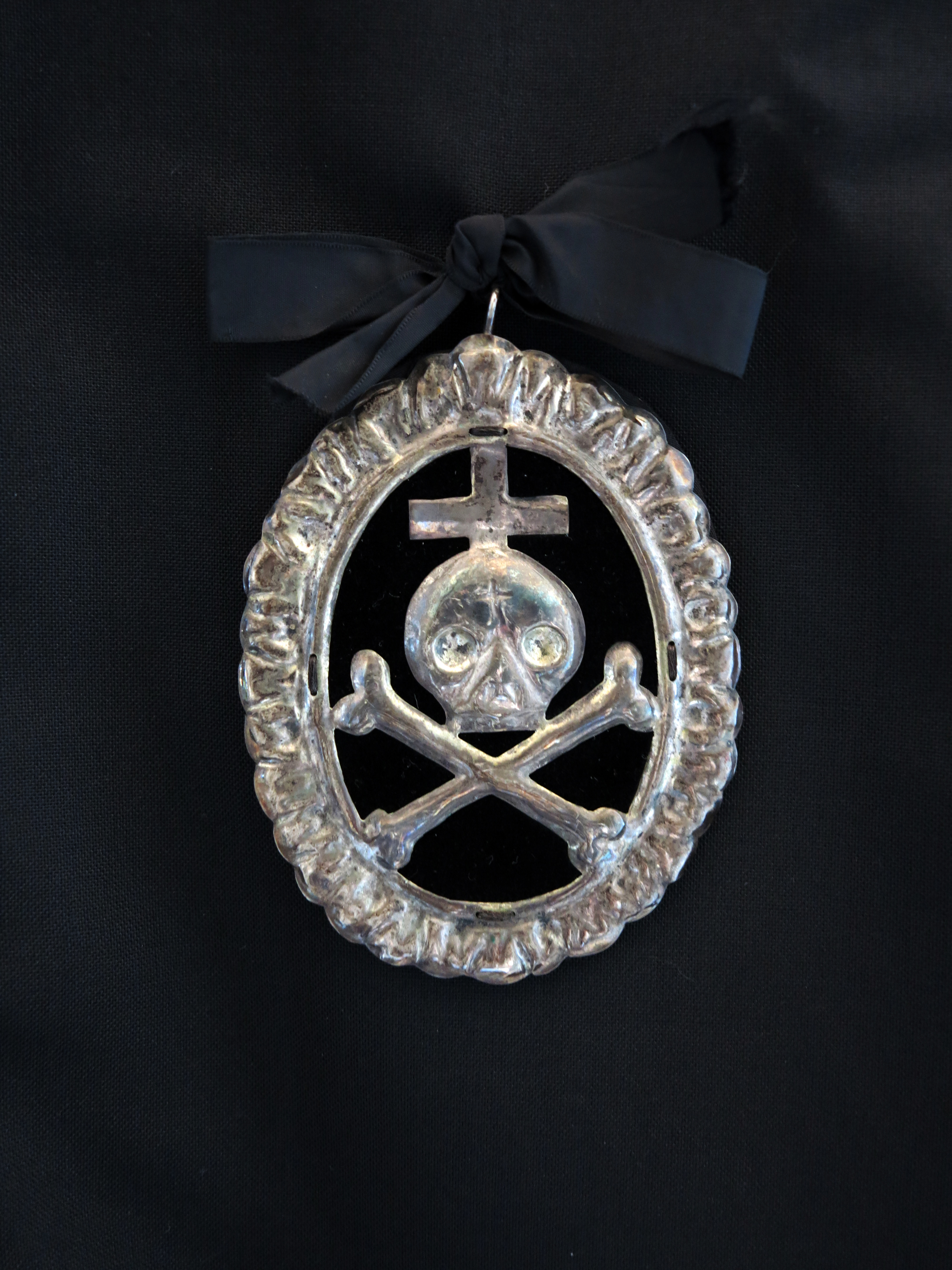 Medaglia riportante il simbolo del Sodalizio